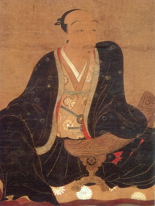 前田利家。Maeda Toshiie. 戦国時代から安土桃山時代の武将。大名。